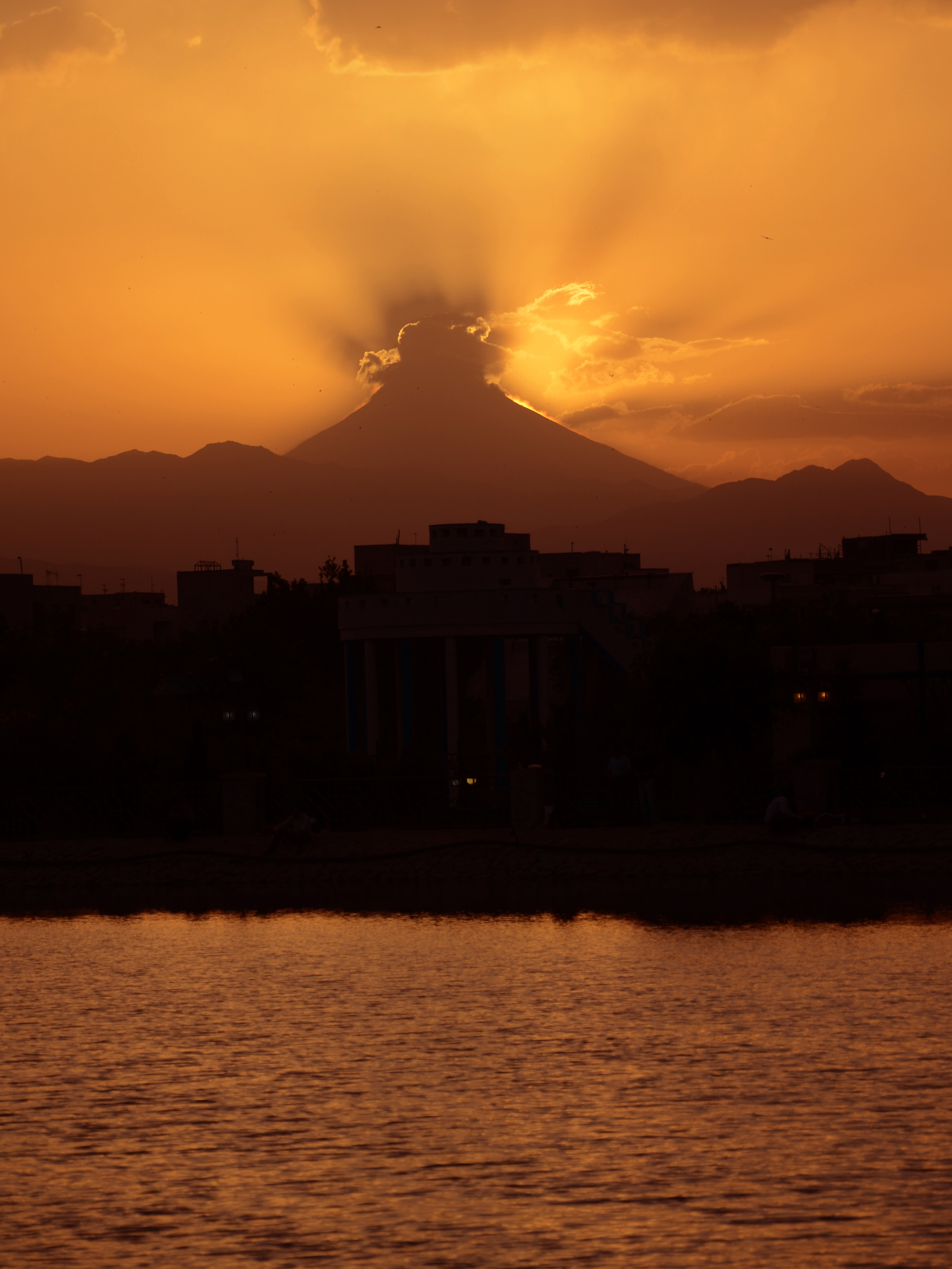 Iran - Tehran - Damavand view